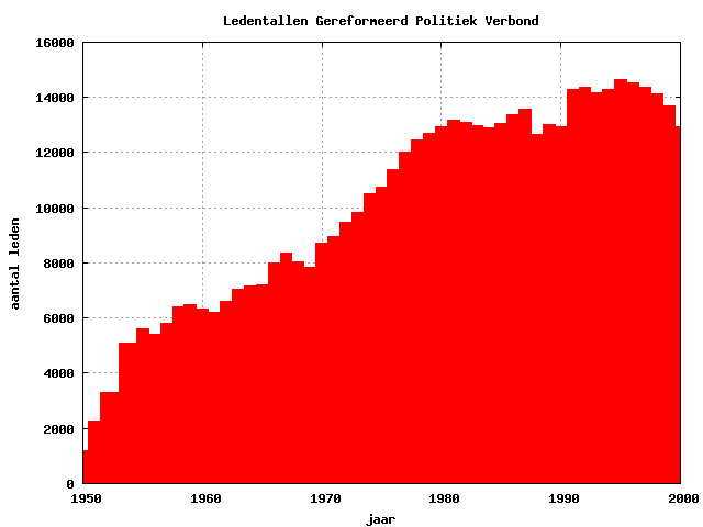 Met gnuplot door mij gemaakte plot op basis van openbare informatie (bron: DNPP)